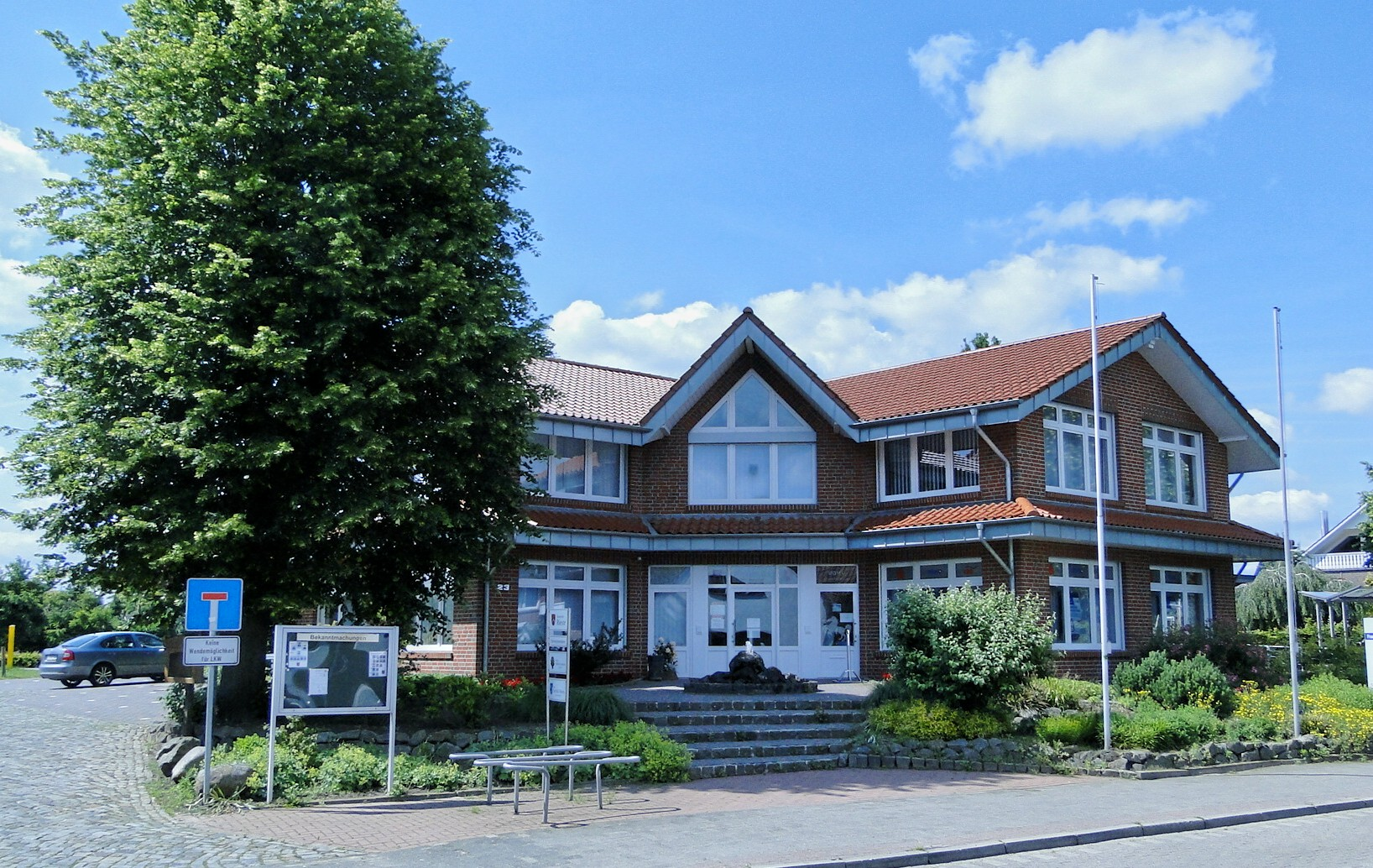 Das Riester Rathaus an der Bahnhofsstraße. Auf der Rückseite befindet sich der Bahnhalt "Rieste".